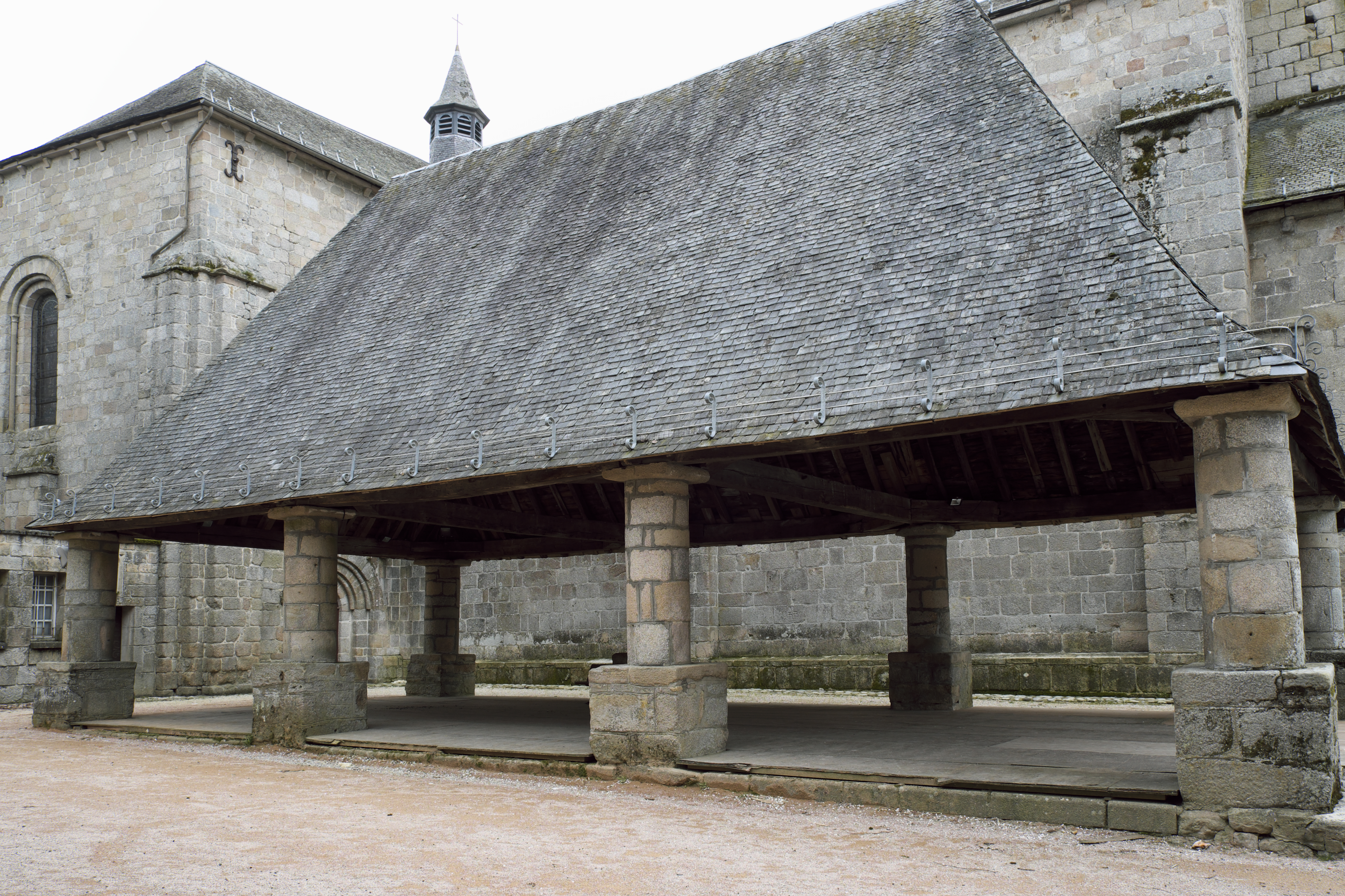 Markthalle in Meymac im Département Corrèze (Nouvelle-Aquitaine/Frankreich), aus dem 16. Jahrhundert